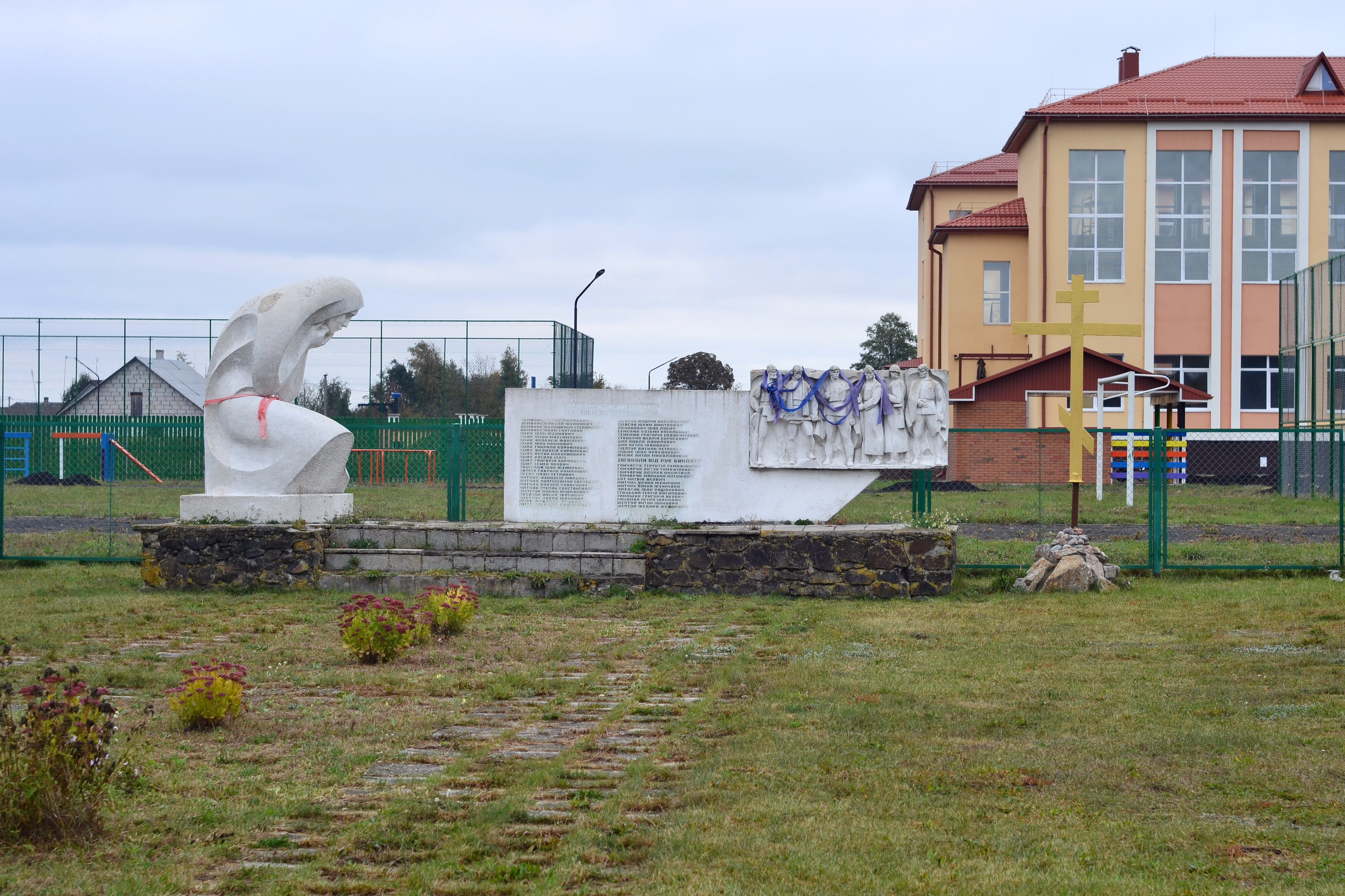 Пам'ятник землякам (1941—1945 роки) - загальний вигляд - Осівці (вул. Центральна) Камінь-Каширський район Волинська область Україна